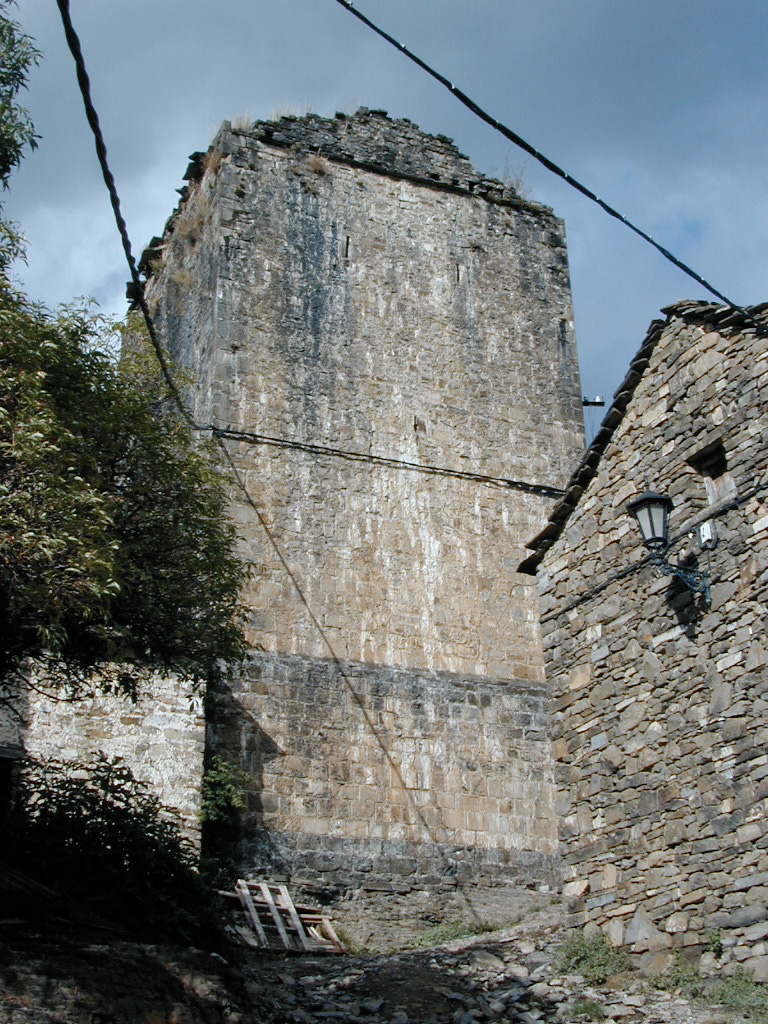 Torre de planta cuadrada de la cárcel de Puértolas (Huesca)